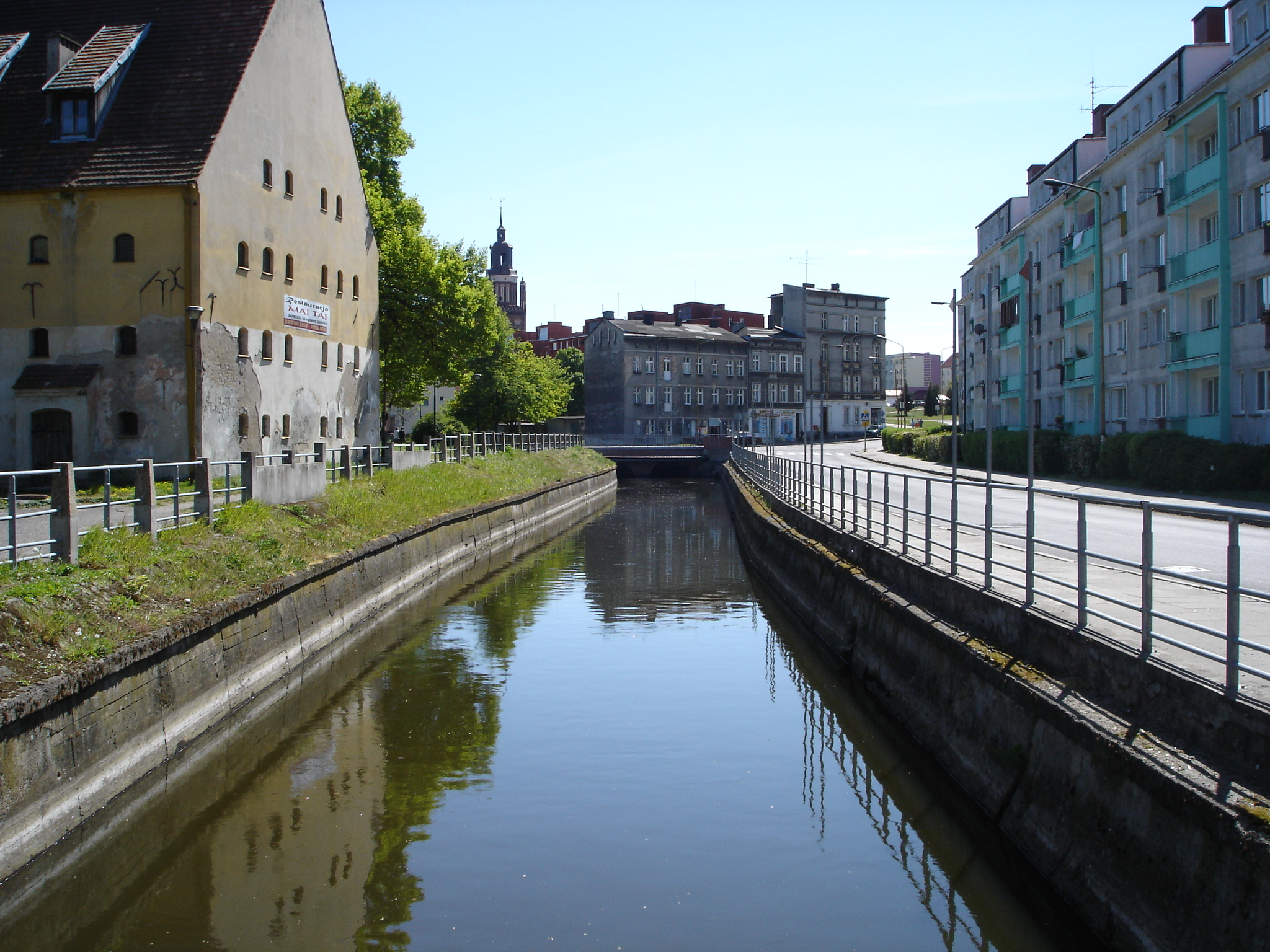 Kanał Młyński w Stargardzie